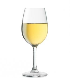 Sensei Collection